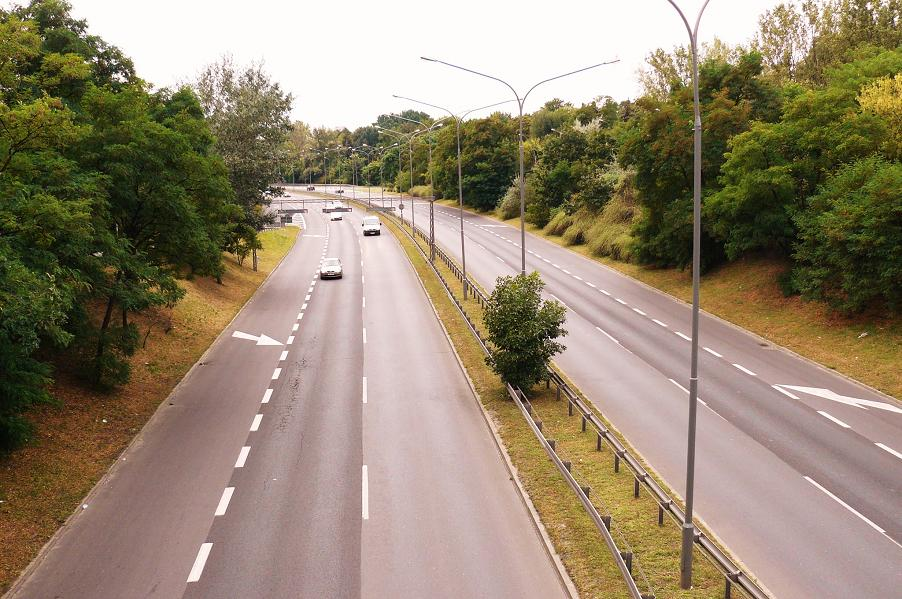 Trasa Niestachowska w Poznaniu.